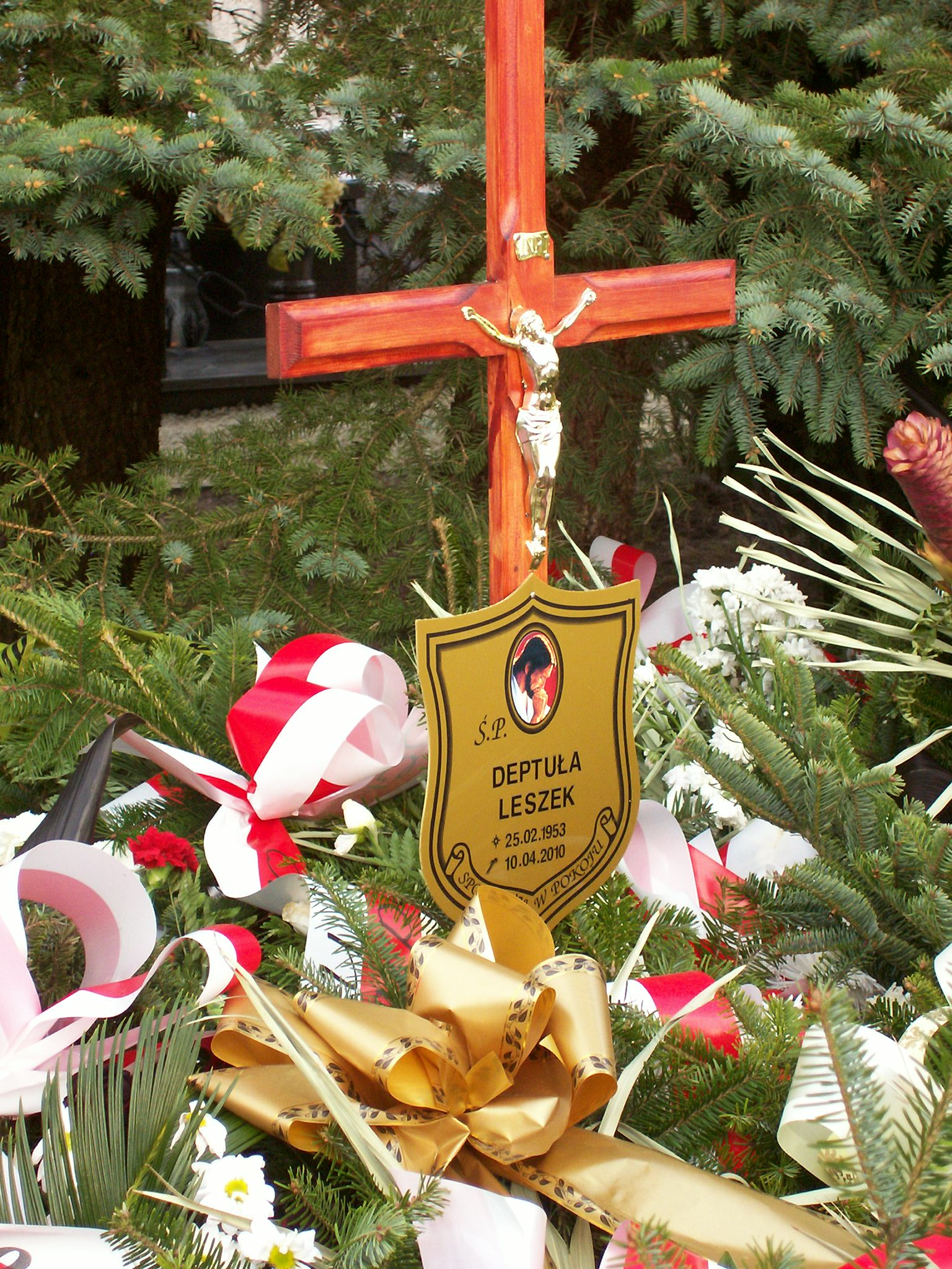 Krzyż z nagrobka posła Leszka Deptuły, który zginął w katastrofie pod Smoleńskiem.